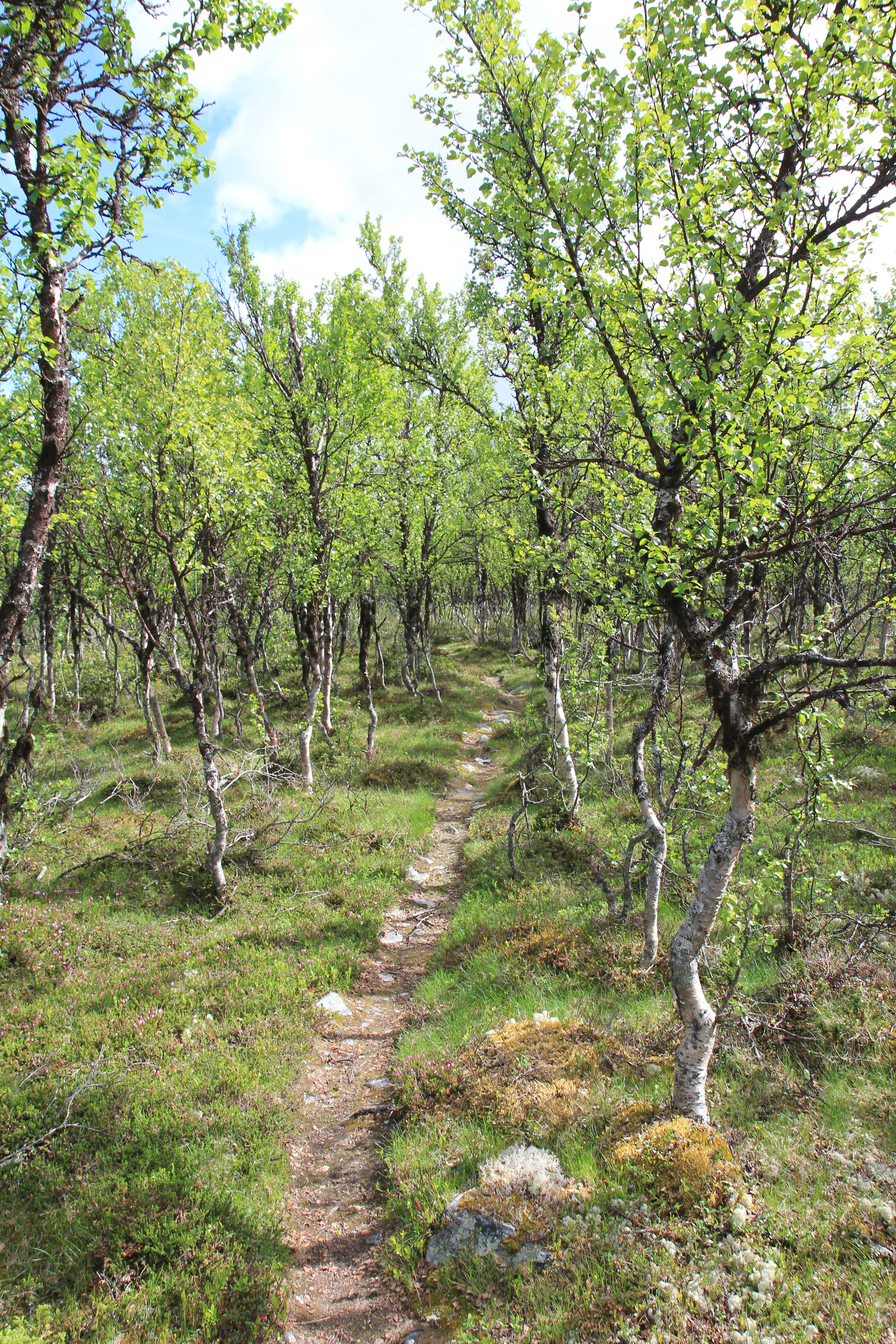 Fjellbjørkeskog